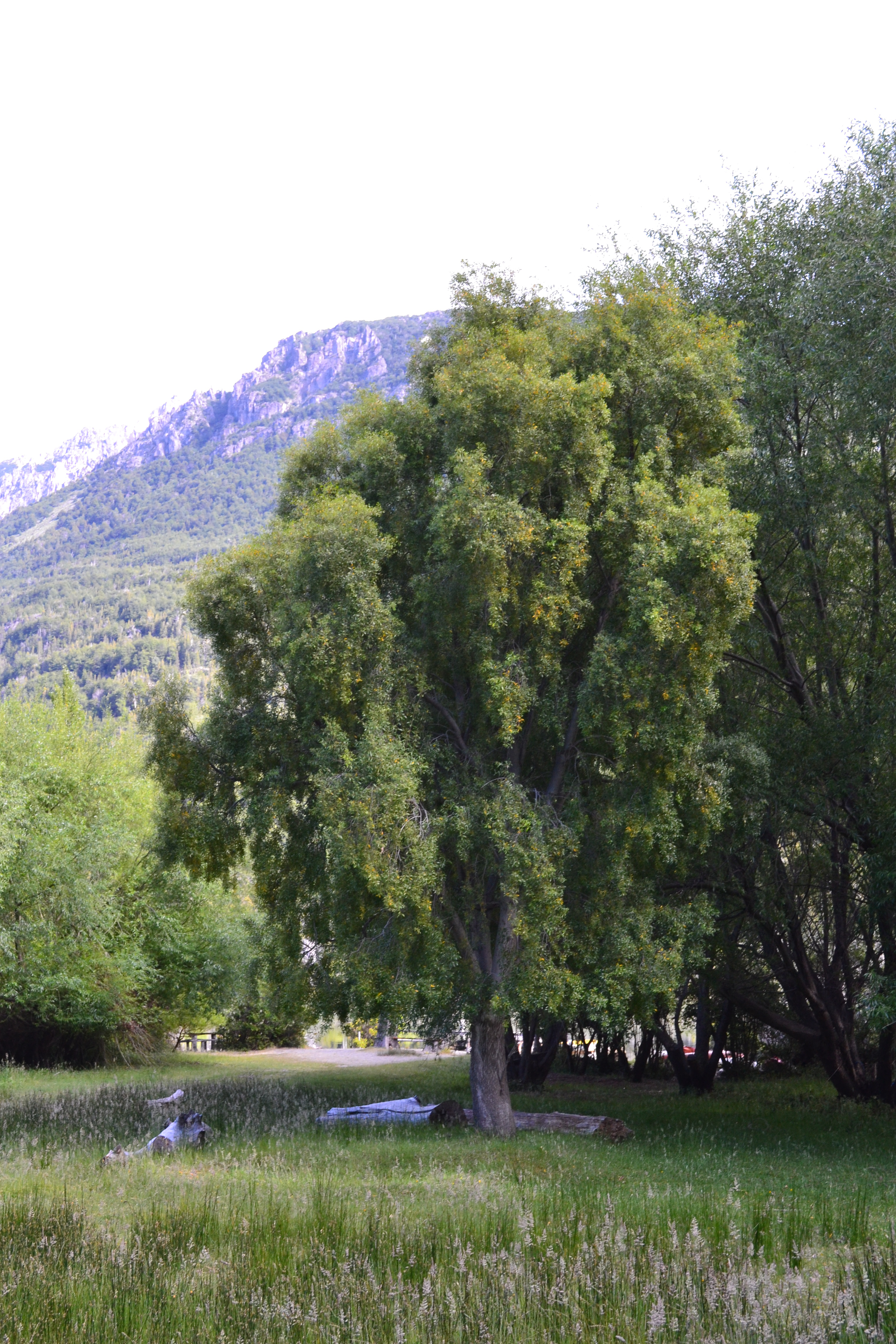 Maitén tree